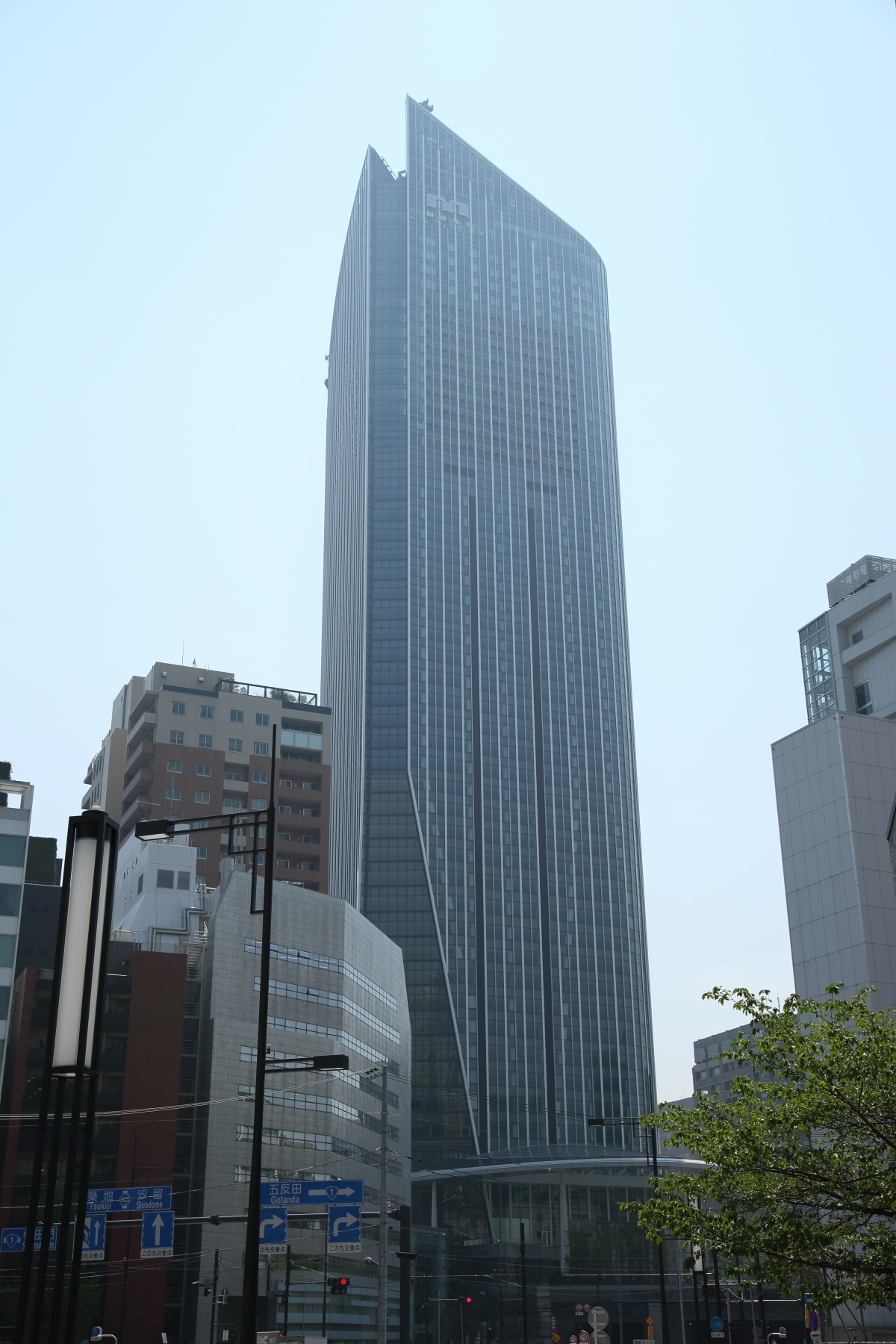 日本の東京都港区にある、虎ノ門ヒルズ。